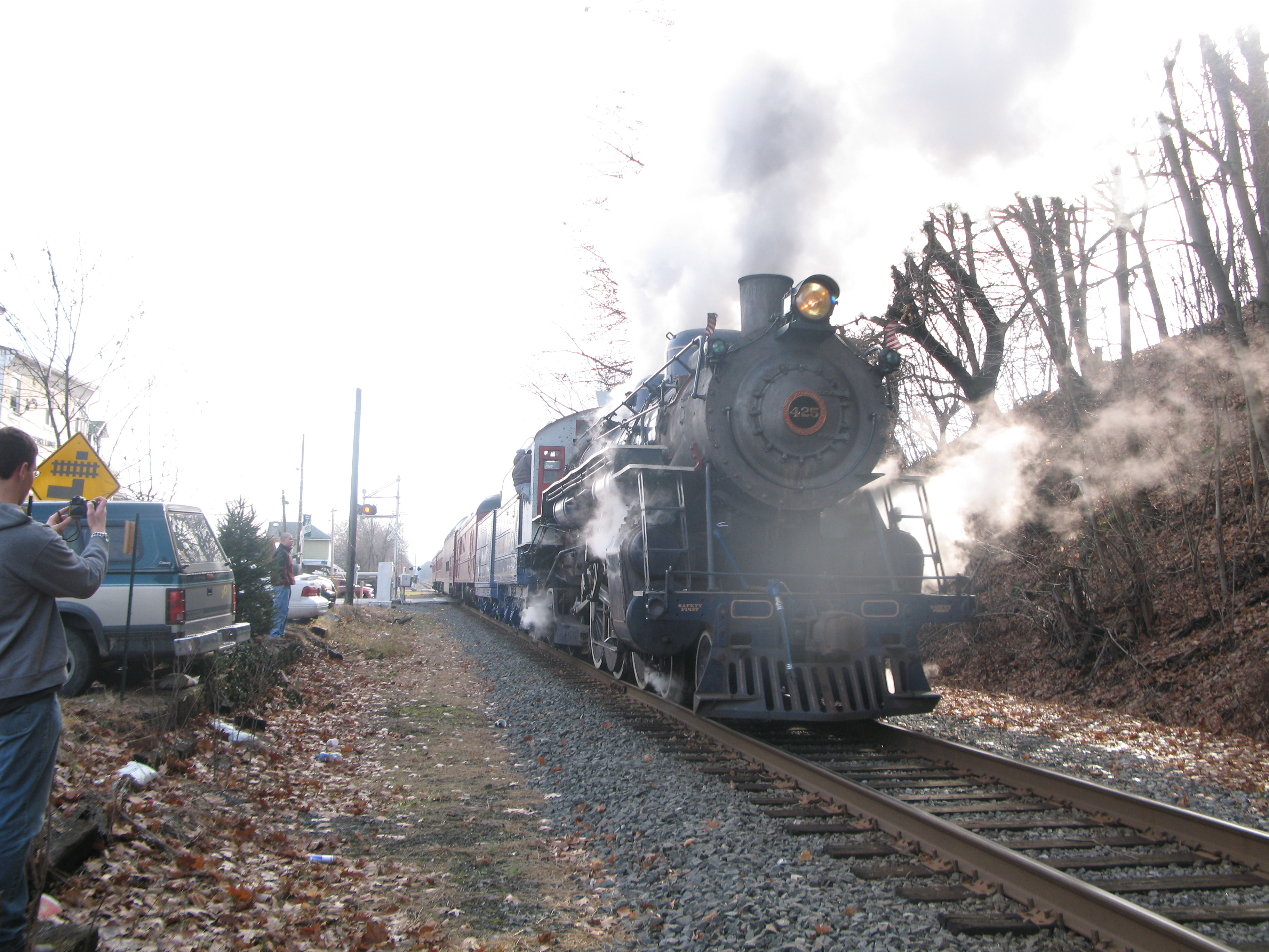 in Leesport, Pennsylvania